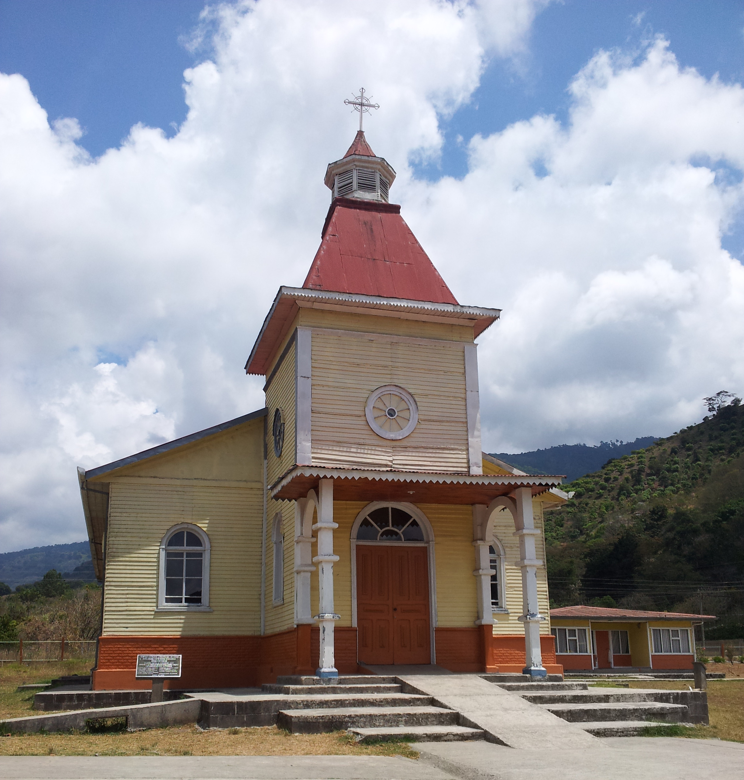 Templo católico construido en 1926. Declarado patrimonio histórico arquitectónico. Decreto 28296-C. Diciembre 1999. Gracias a la Asociación Ecológica Cerro Vueltas por conservar este patrimonio